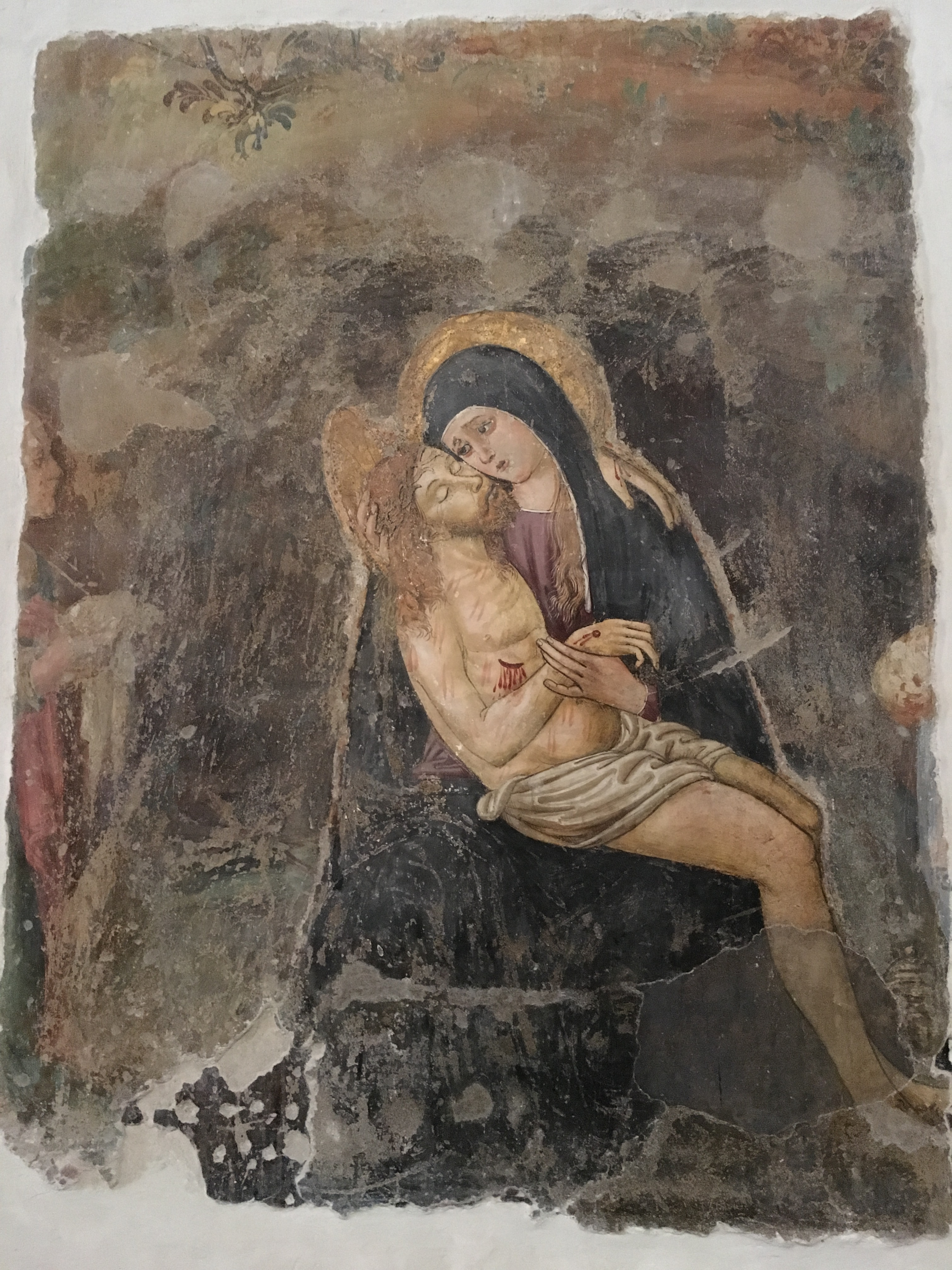 Chiesa di San Domenico. Spoleto. Pietà di pittore quattrocentesco. Opera copiata da Ingres nel 1839